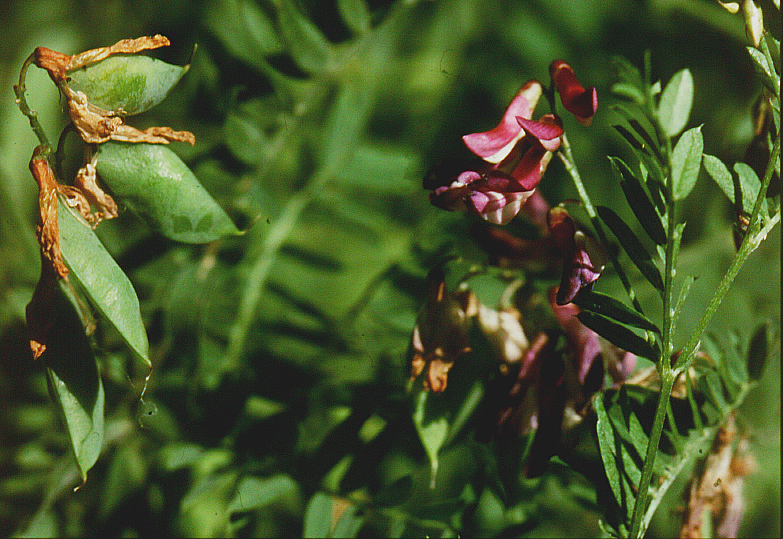 eigenes Foto von 1981, Unterfranken